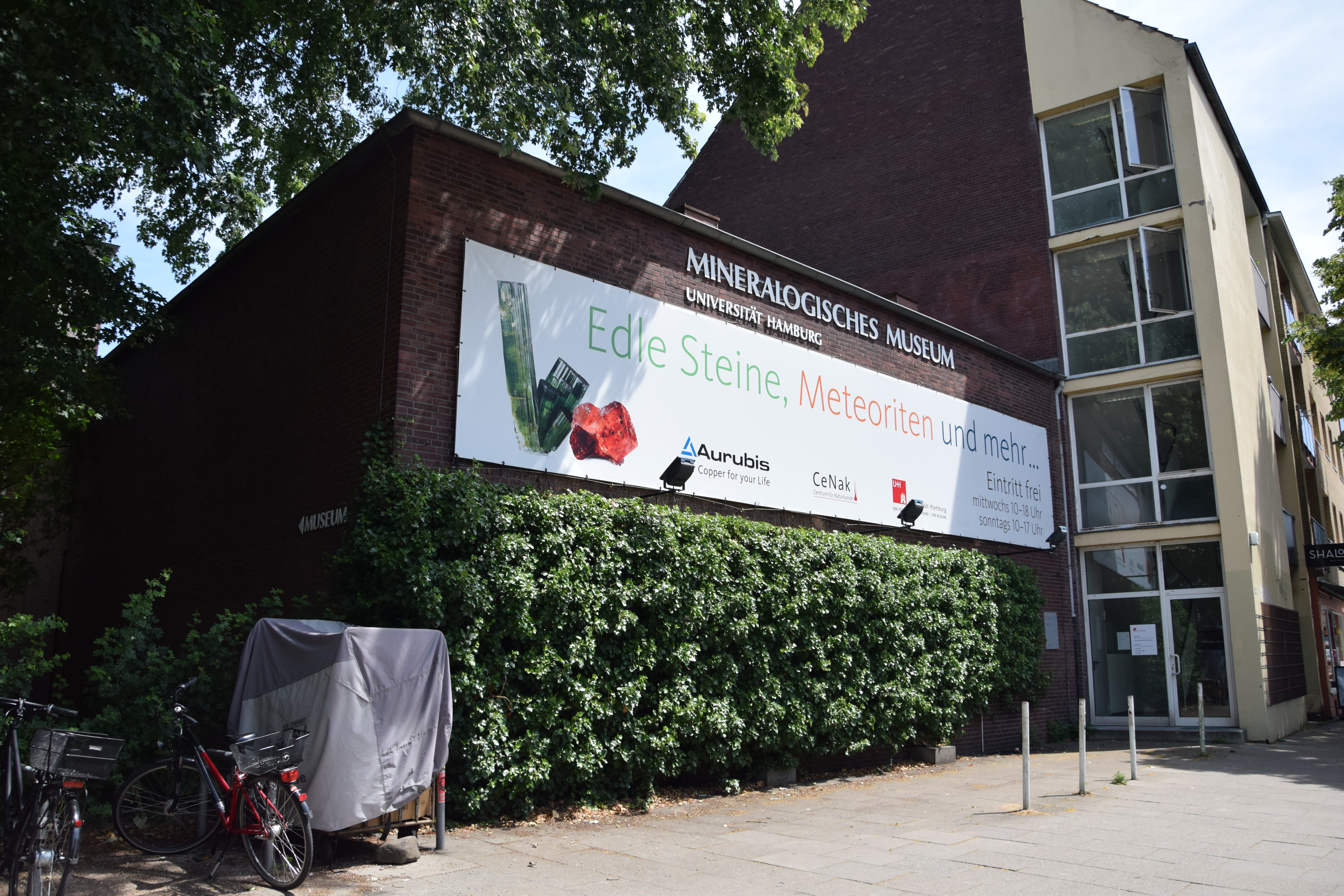 Eingang des Mineralogischen Museums Hamburg